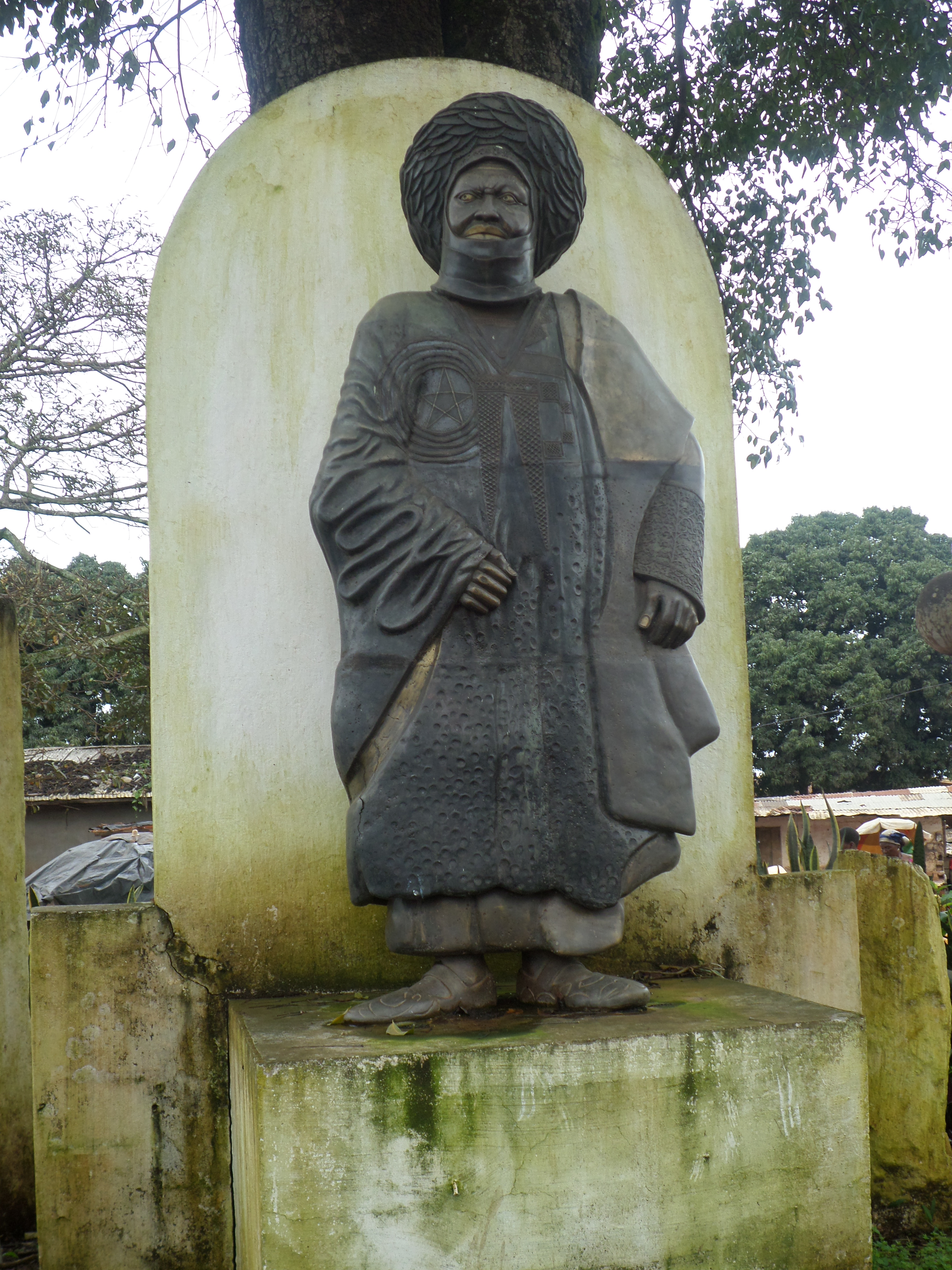 Statue du roi Njoya à Foumban, Cameroun.